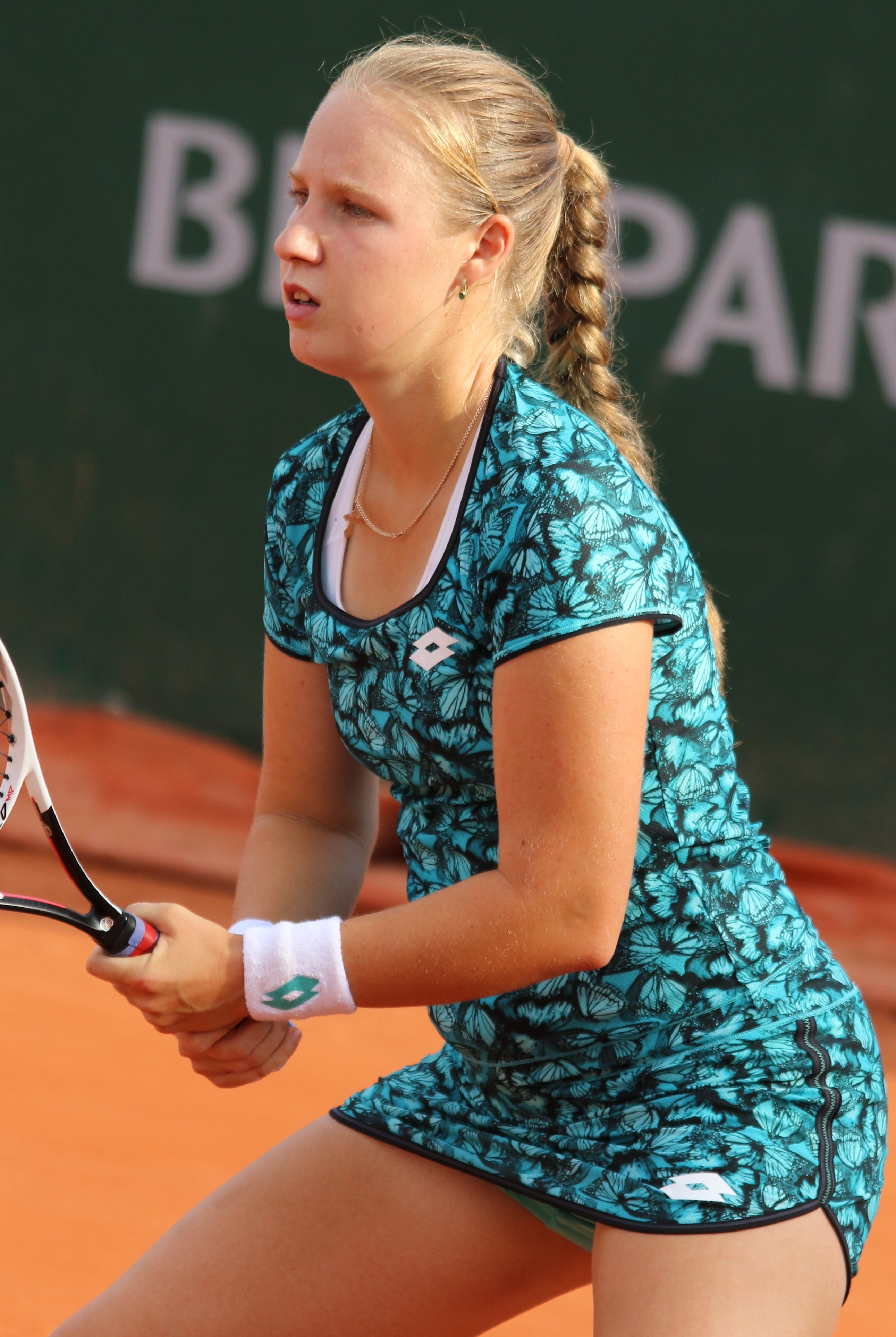 Blinkova RG18 (7)